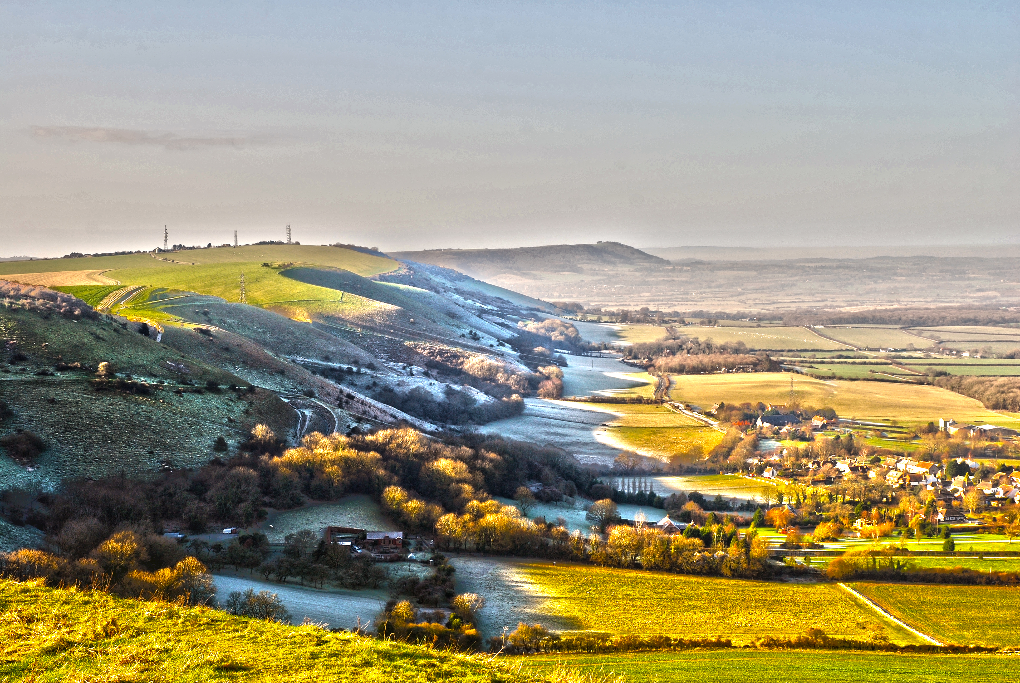 near Devils Dyke,Jan 2012